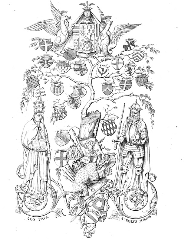 Copie d'illustration du livre de jean Cayon : Ancienne chevalerie de Lorraine